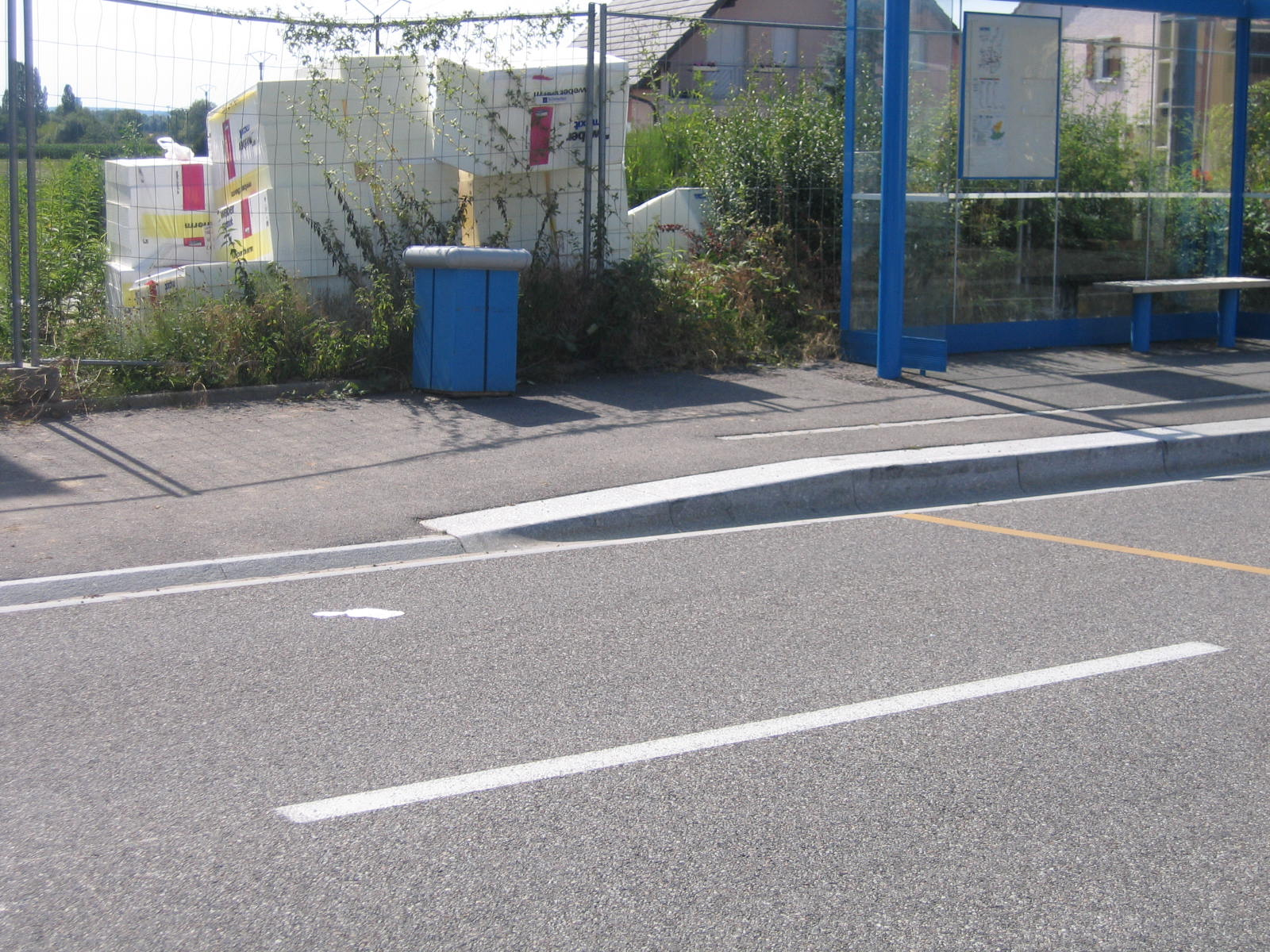 Rehaussement du trottoir au niveau de l'arrêt "Rue de Huningue" à Village-Neuf pour permettre aux personnes à mobilité réduite l'accès facile aux bus.